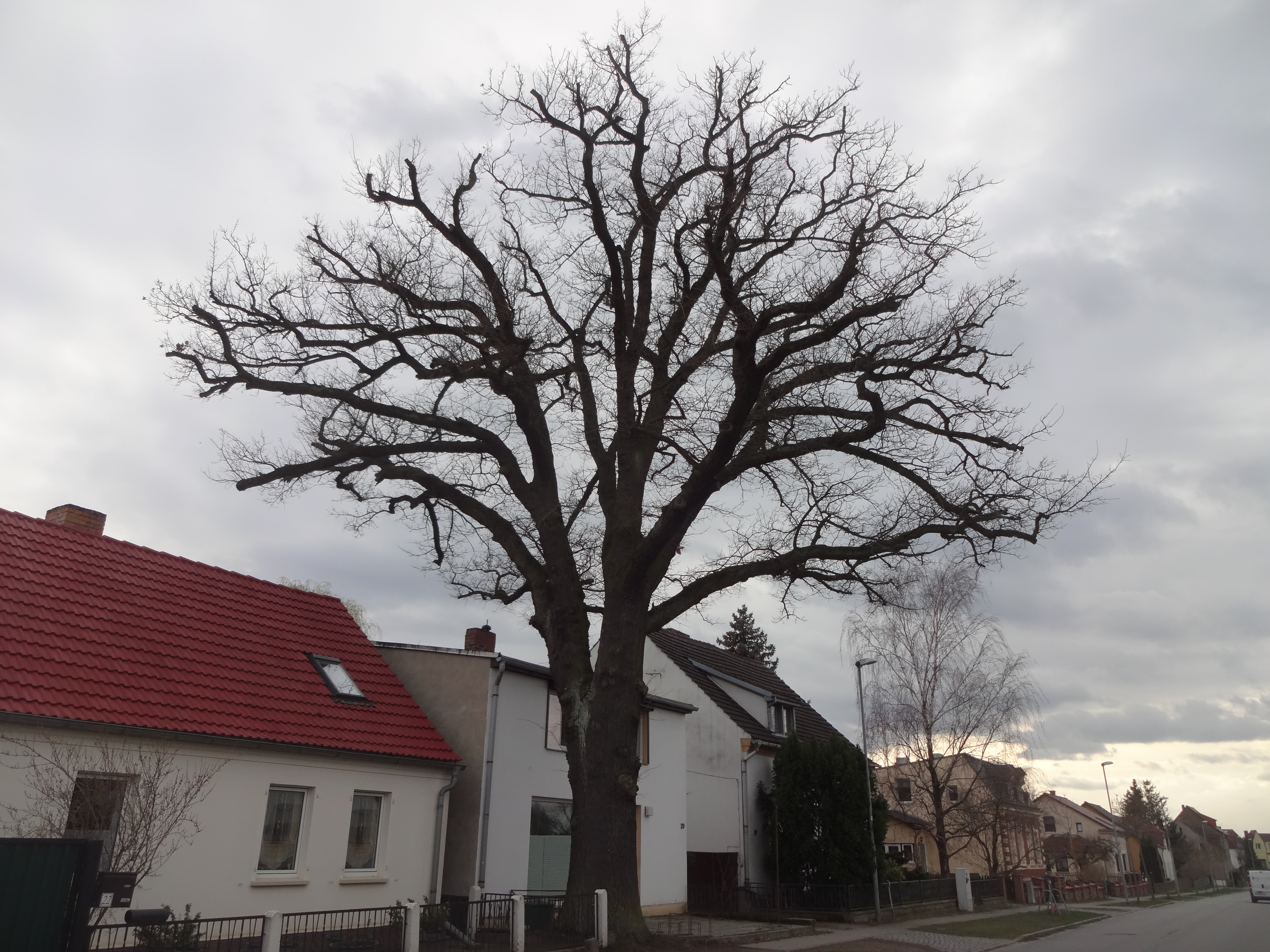 als Naturdenkmal geschützte Stiel-Eiche vor den Häusern Plötziner Straße 20 und in Göhlsdorf (in der Naturdenkmalliste als Hausnummer 37 geführt)